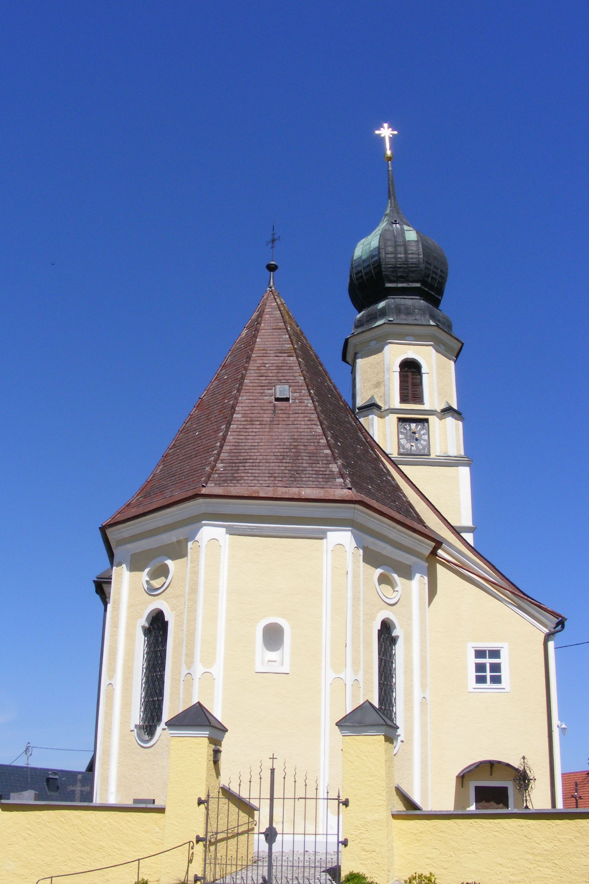 Filialkirche St. Stephan in Vormoos, Gemeinde Feldkirchen bei Mattighofen, Bezirk Braunau, Oberösterreich